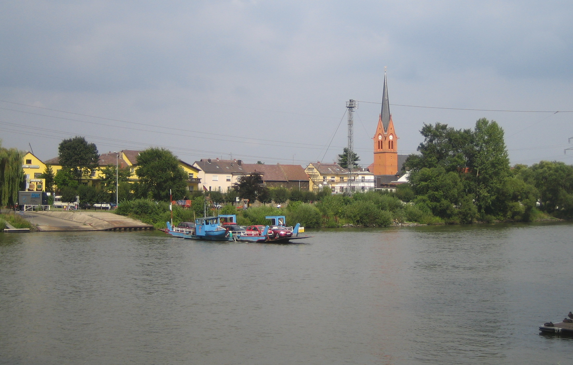 Mainfähre vor Maintal-Dörnigheim